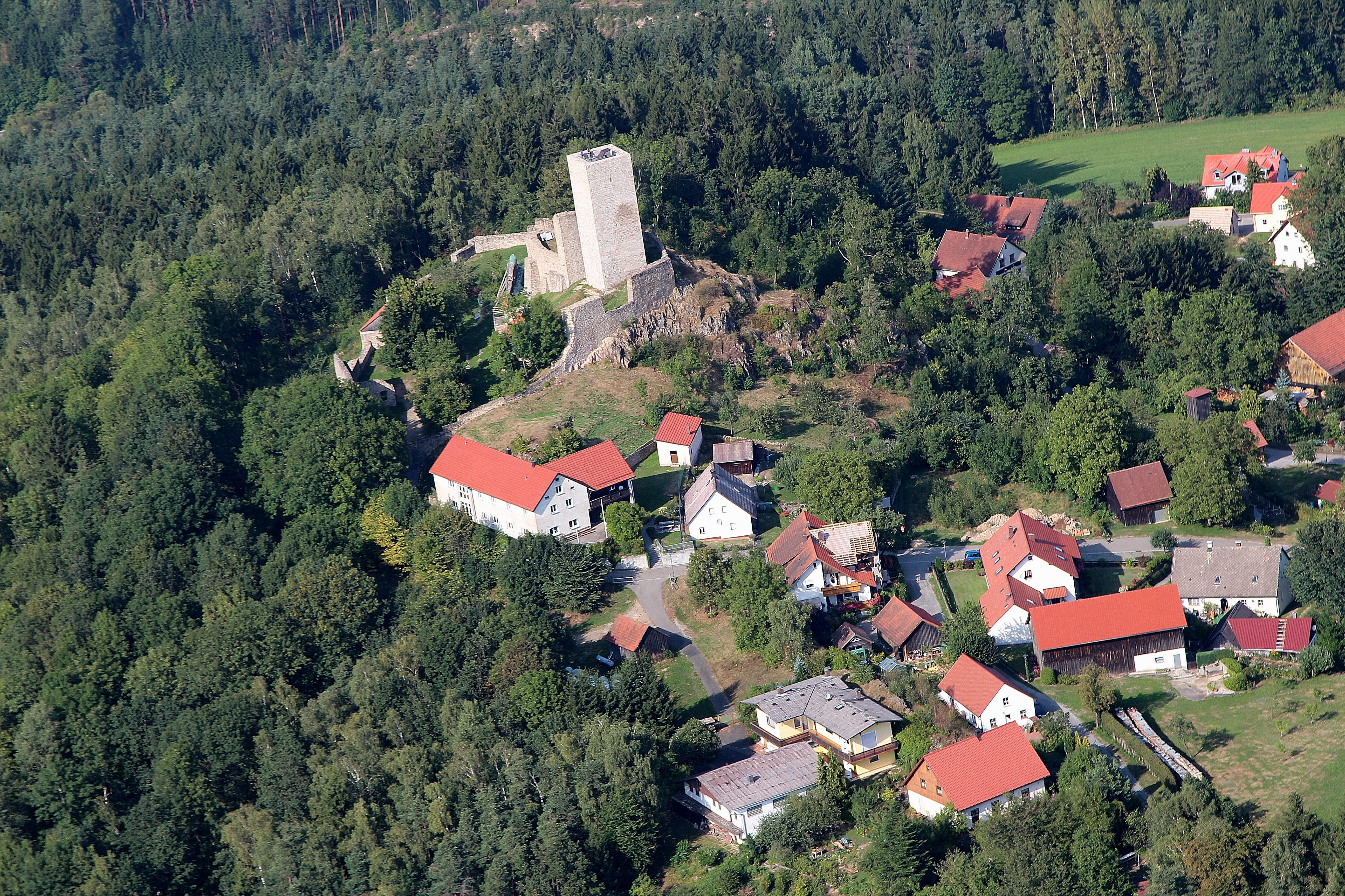 Burganlage Haus Murach, Stadt Oberviechtach, Landkreis Schwandorf, Oberpfalz, Bayern